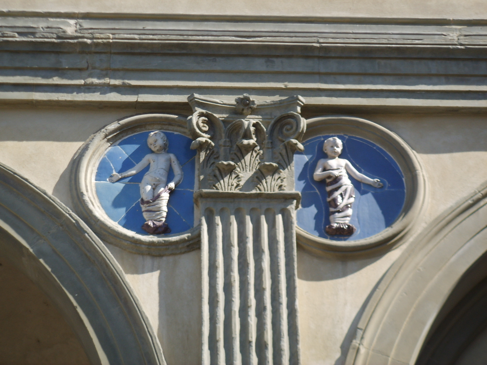 Spedale degli innocenti, tondo andrea della robbia 12-13